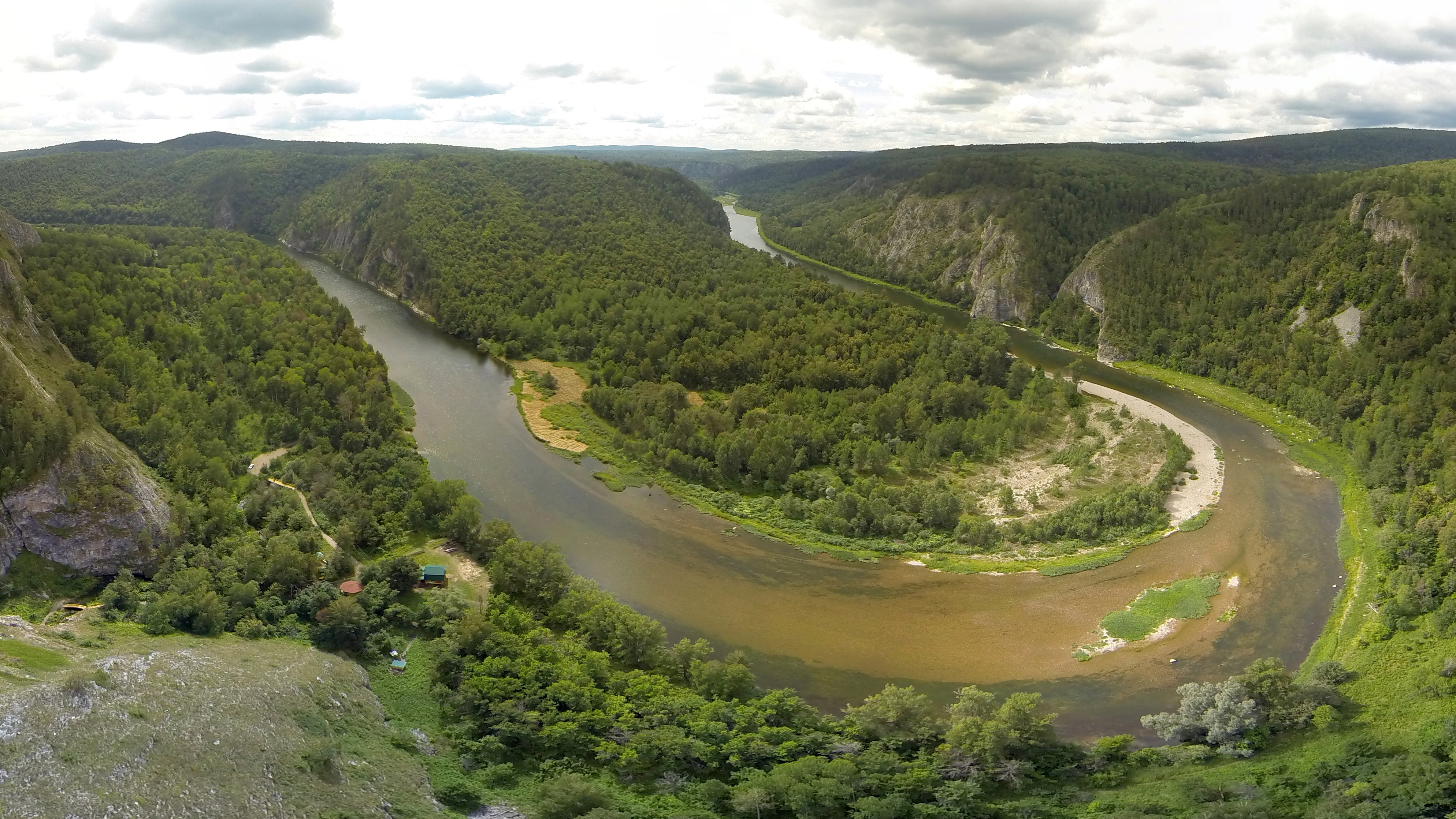 Капова пещера (Шульган-Таш), Бурзянский район This image is related to the protected area of Russia number 0220101